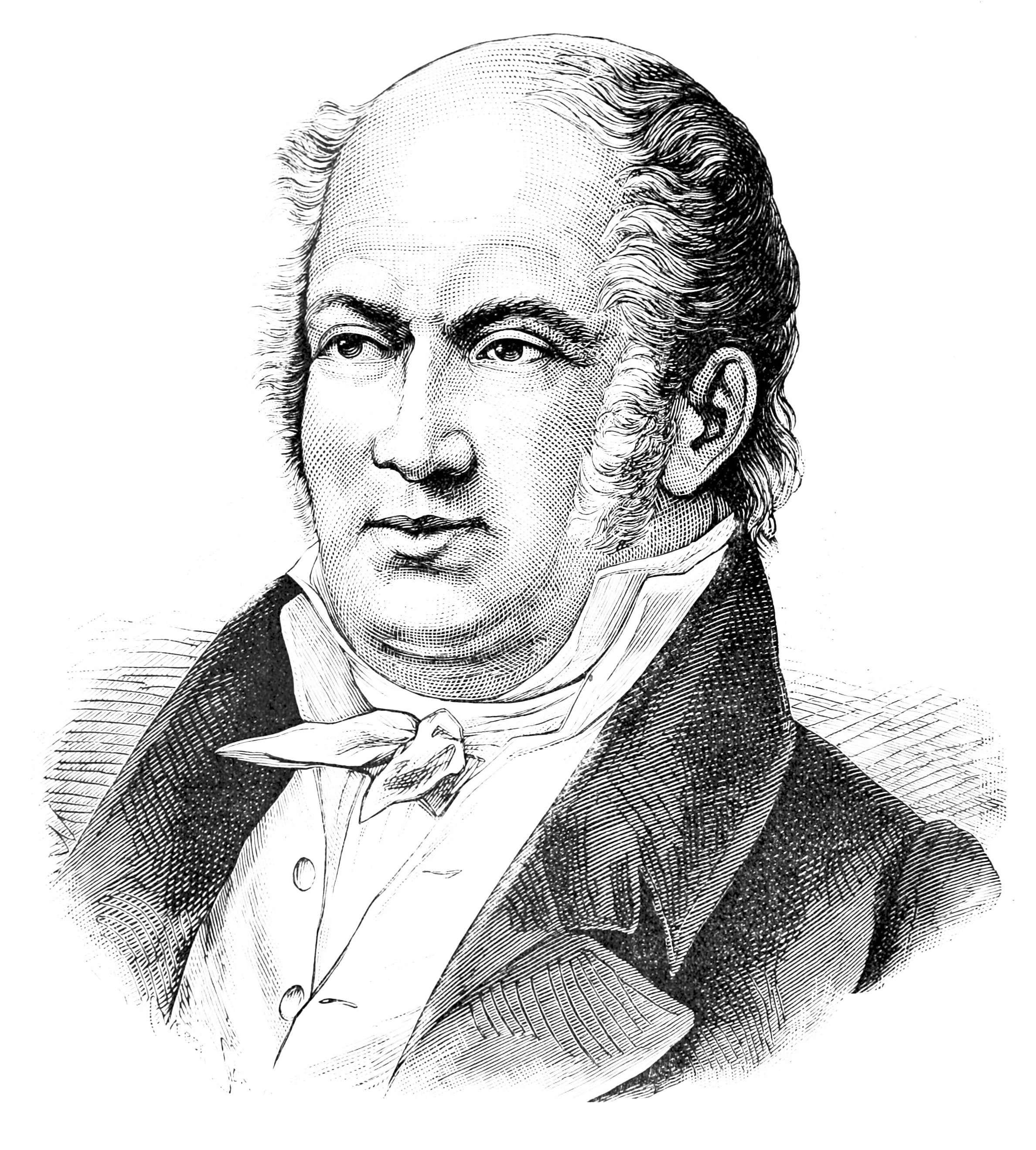 Etienne Geoffroy Saint Hillaire